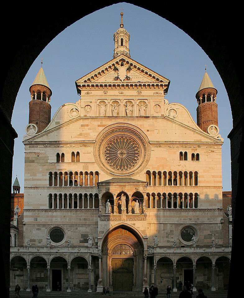 Facciata della cattedrale di Cremona scattata dai portici del Comune